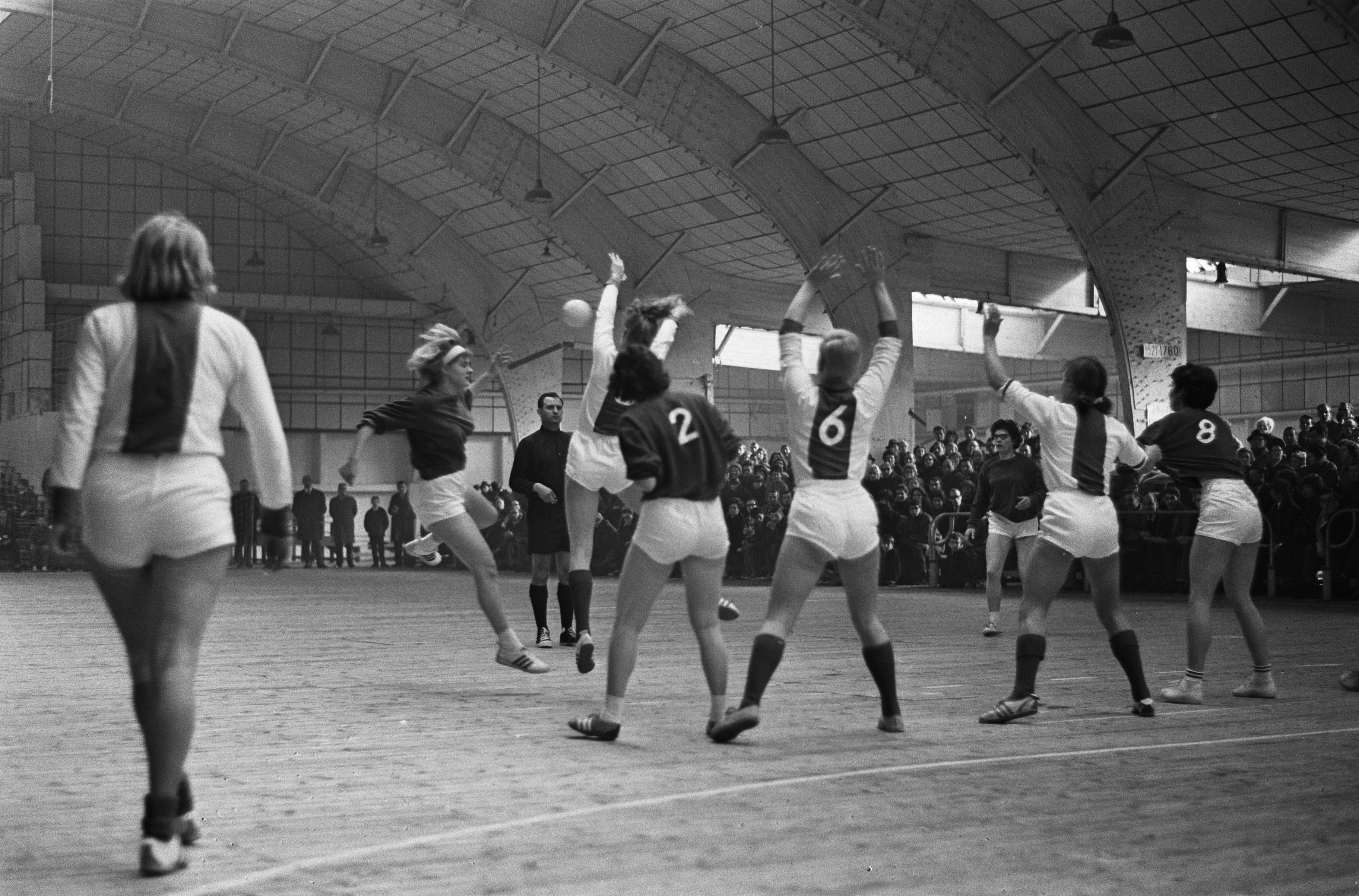 Collectie / Archief : Fotocollectie Anefo Reportage / Serie : [ onbekend ] Beschrijving : Zaalhandbal Zeeburg tegen Swift 0-2, spelmomenten Datum : 28 februari 1965 Trefwoorden : Zaalhandbal Persoonsnaam : Zeeburg Instellingsnaam : Swift Fotograaf : Steinmeier, Hans / Anefo Auteursrechthebbende : Nationaal Archief Materiaalsoort : Negatief (zwart/wit) Nummer archiefinventaris : bekijk toegang 2.24.01.05 Bestanddeelnummer : 917-4829